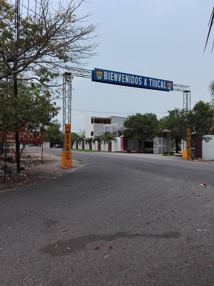 UN ROTULO DE BIENVENIDA